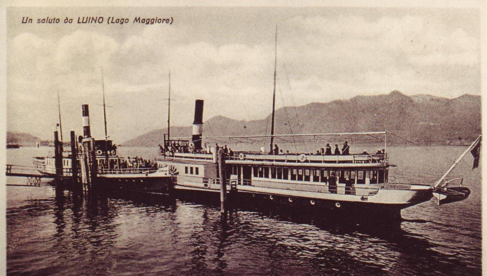 Foto del Piroscafo Regina Madre a Luino agli inizi del 900